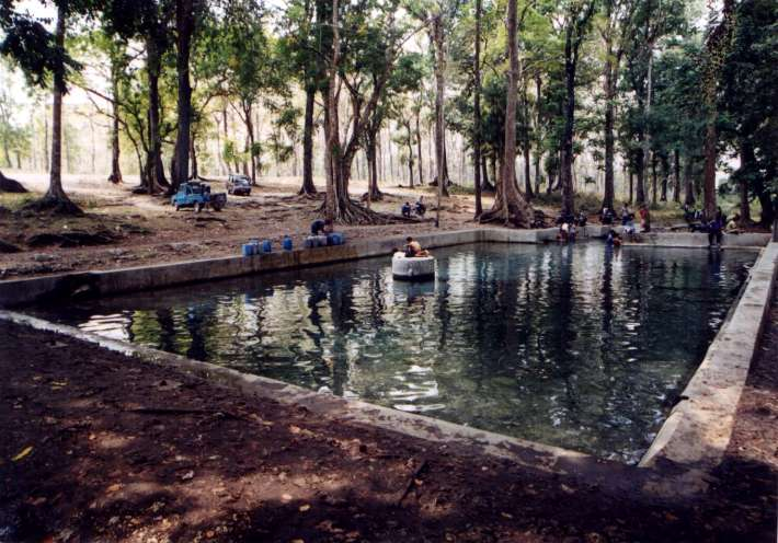 sendang coyo